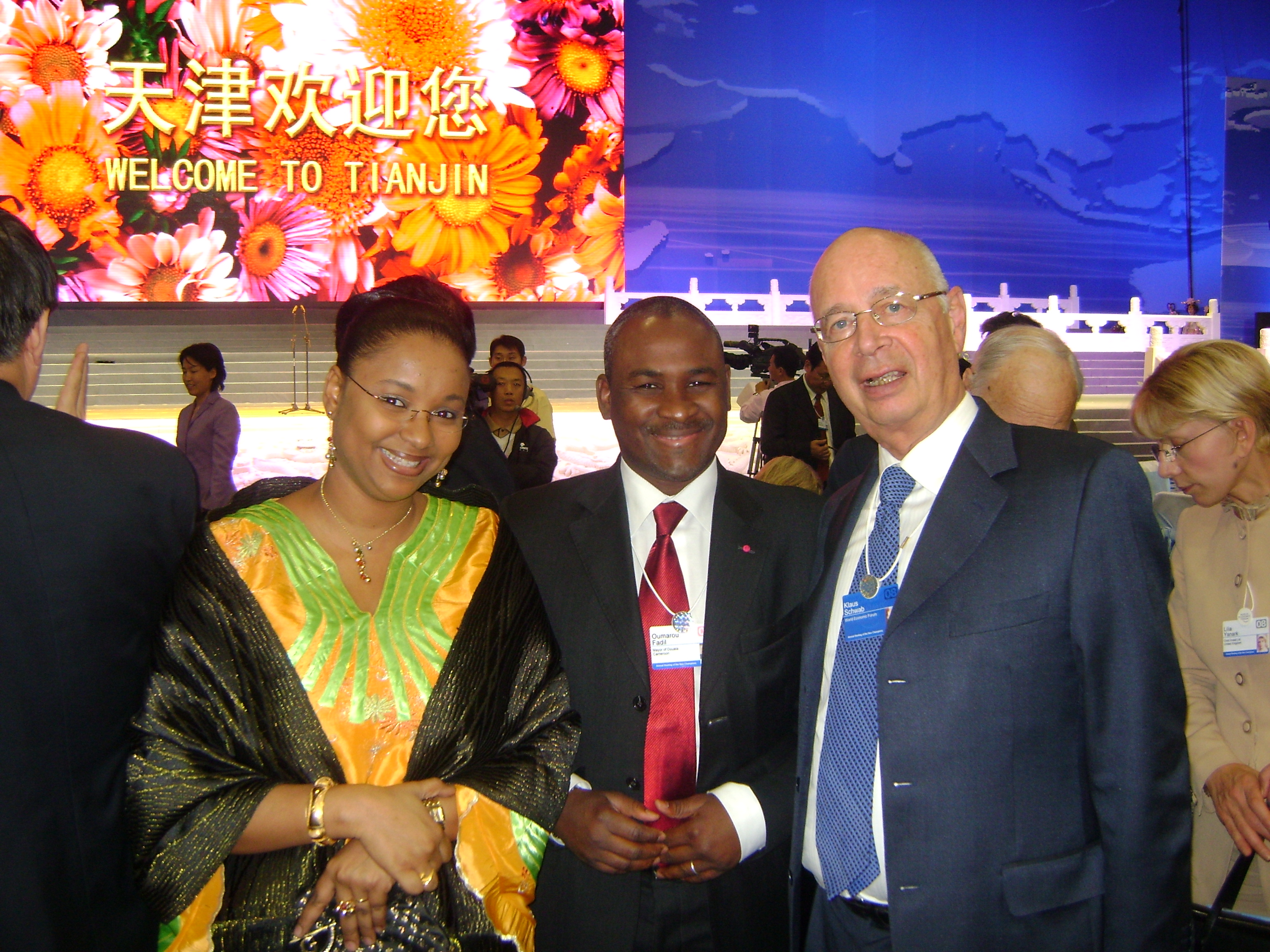 Oumarou Fadil and his wife Hassanatou Mamadou at the world economic forum with Klaus Schwab